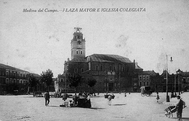 Plaza Mayor - Medina del Campo (Valladolid) - Imprenta y Papelería de Sendino. Plaza Mayor e Iglesia Colegiata. - Tarjeta postal. Papel 138 x 89 B/N